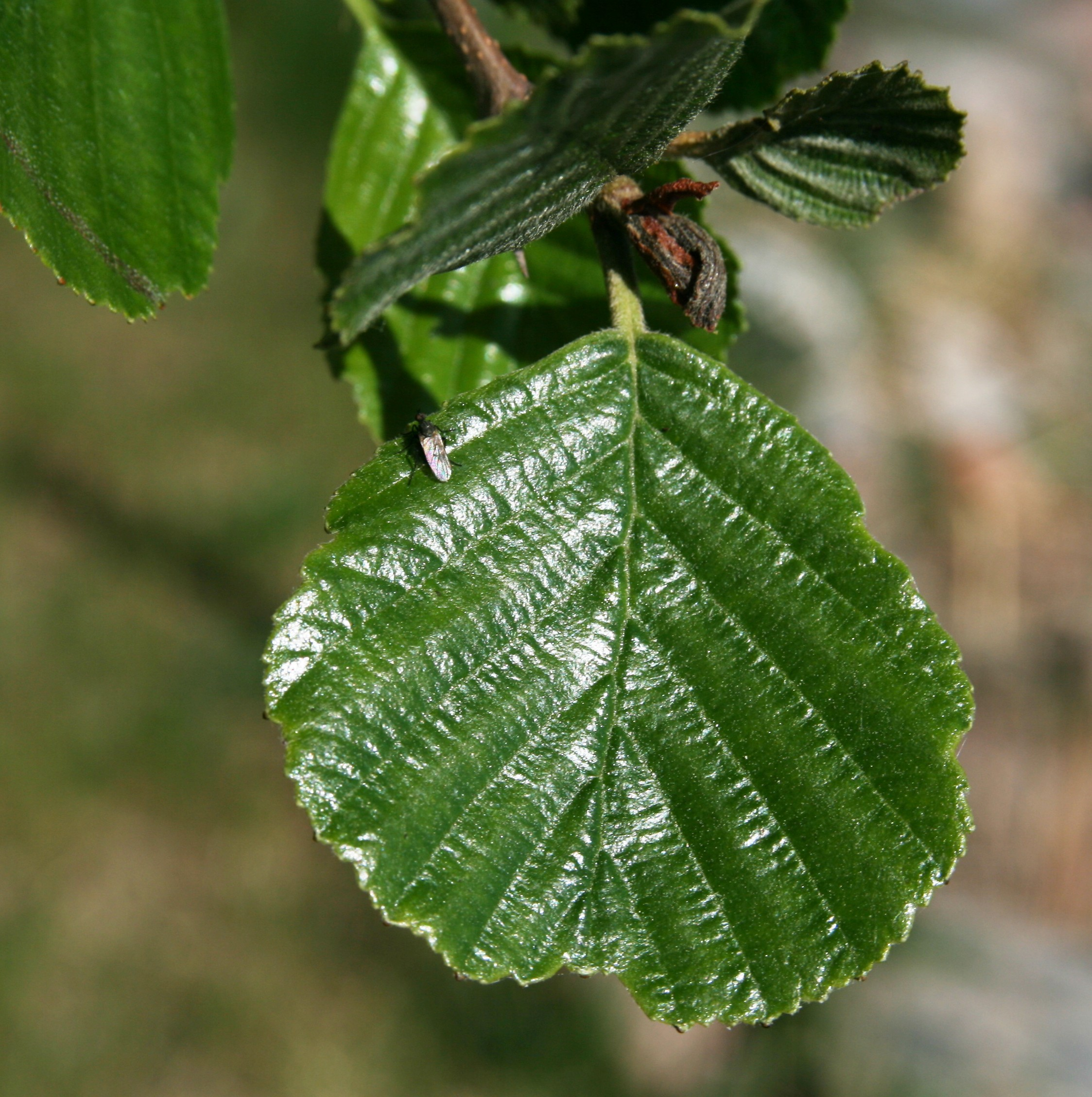 Tervaleppä, Alnus glutinosa